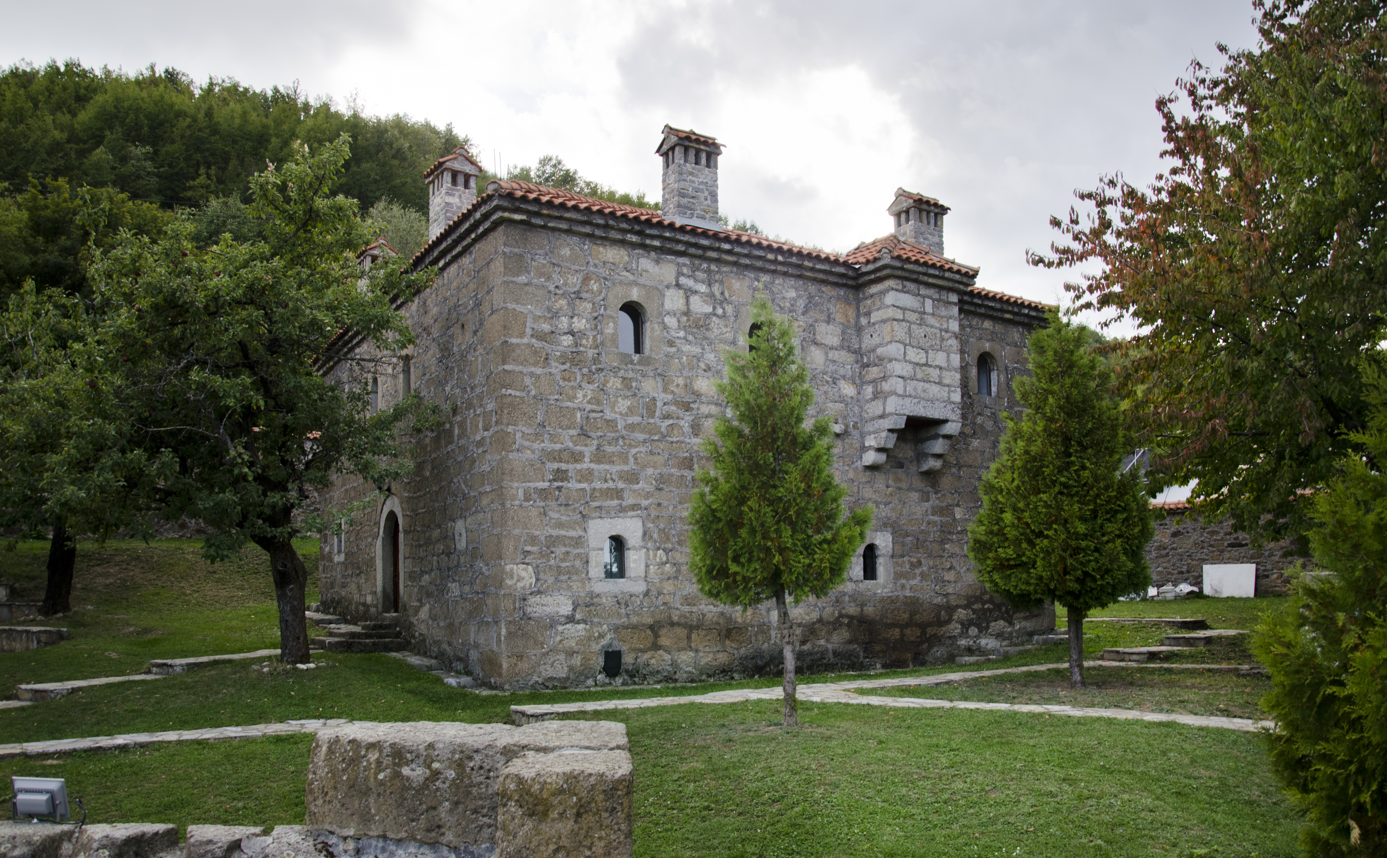 Kompleksi i Kullës së Isë Boletinit - Ambienturë